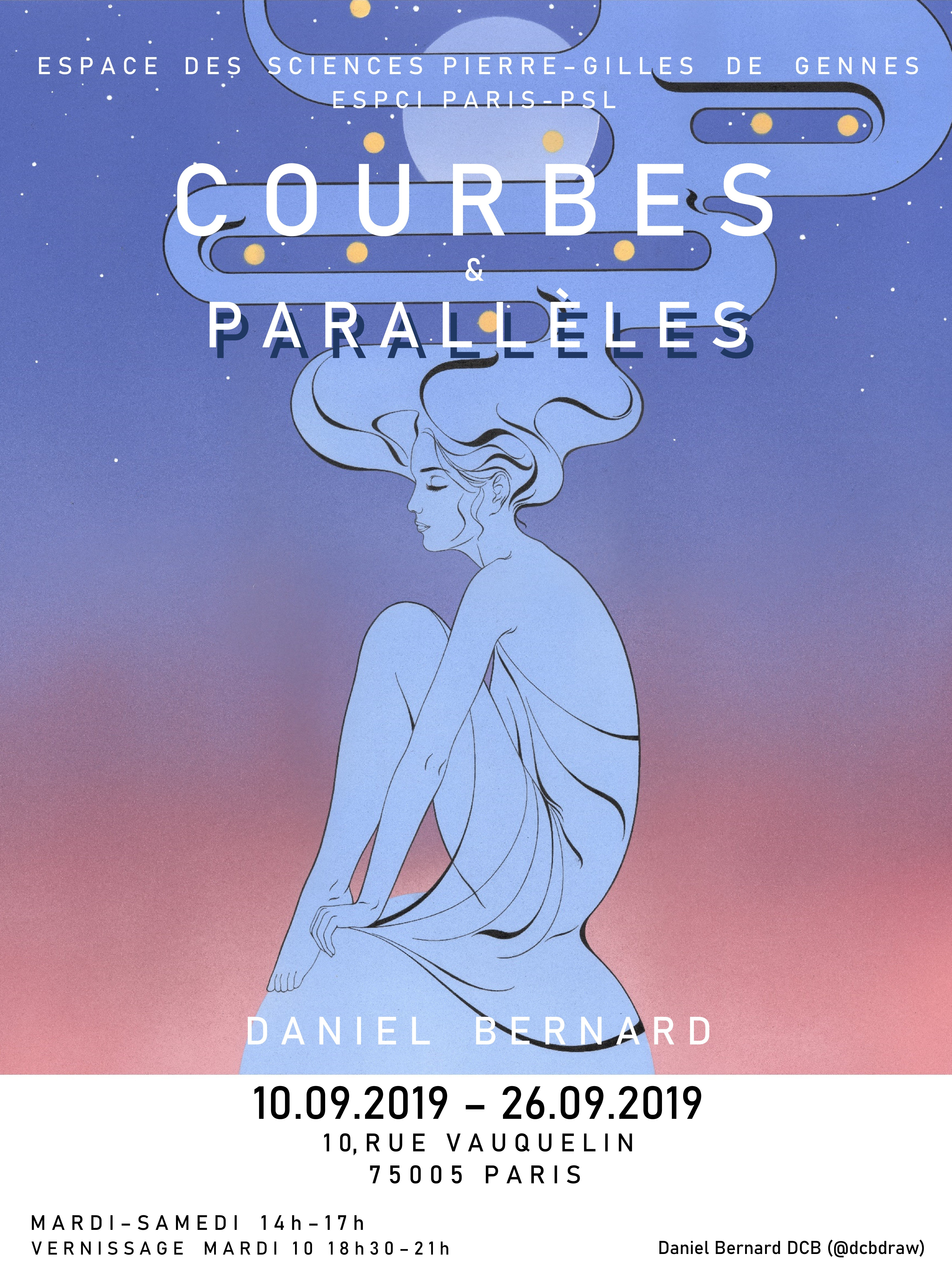 Affiche (poster) réalisé par l'artiste Daniel Bernard (DCB) (own work), pour son exposition (exhibition) à l'Espace des sciences ESPGG - Paris (soutenue par la ville de Paris). Cette version du fichier est présentée sans les logos de soutiens à mon exposition (this version is without logos of supports for my exhibition). IG : Daniel Bernard DCB (@dcbdraw)